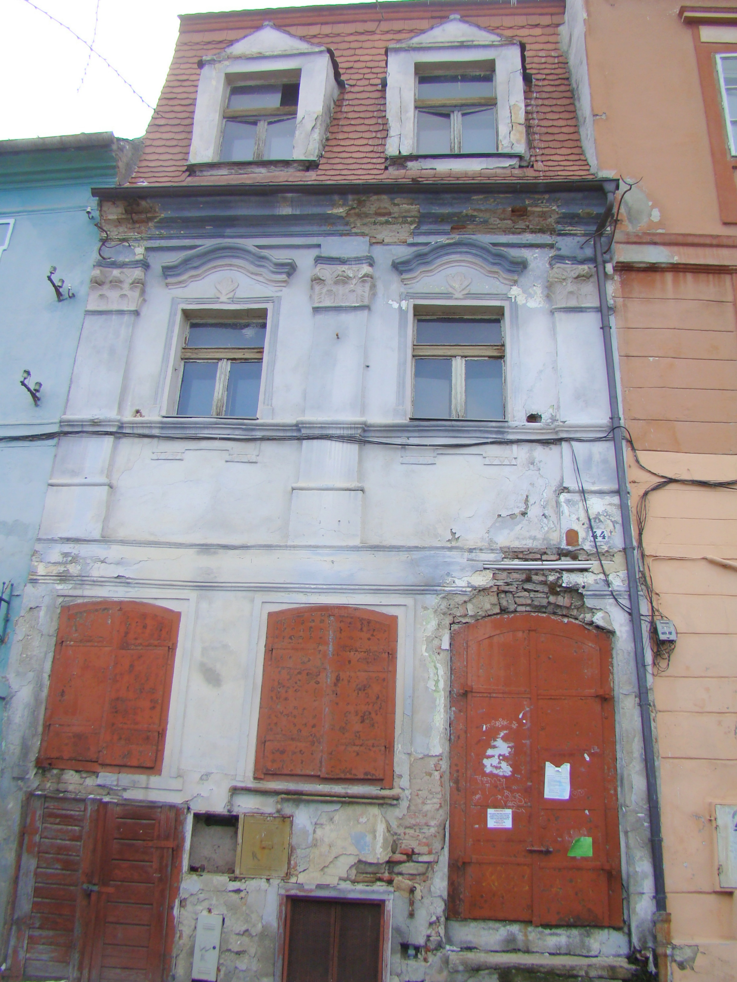 Casa Csutak, municipiul Sighișoara, Piața Oberth Hermann 44 sec. XVI,1676 - 1700, sec. XVIII